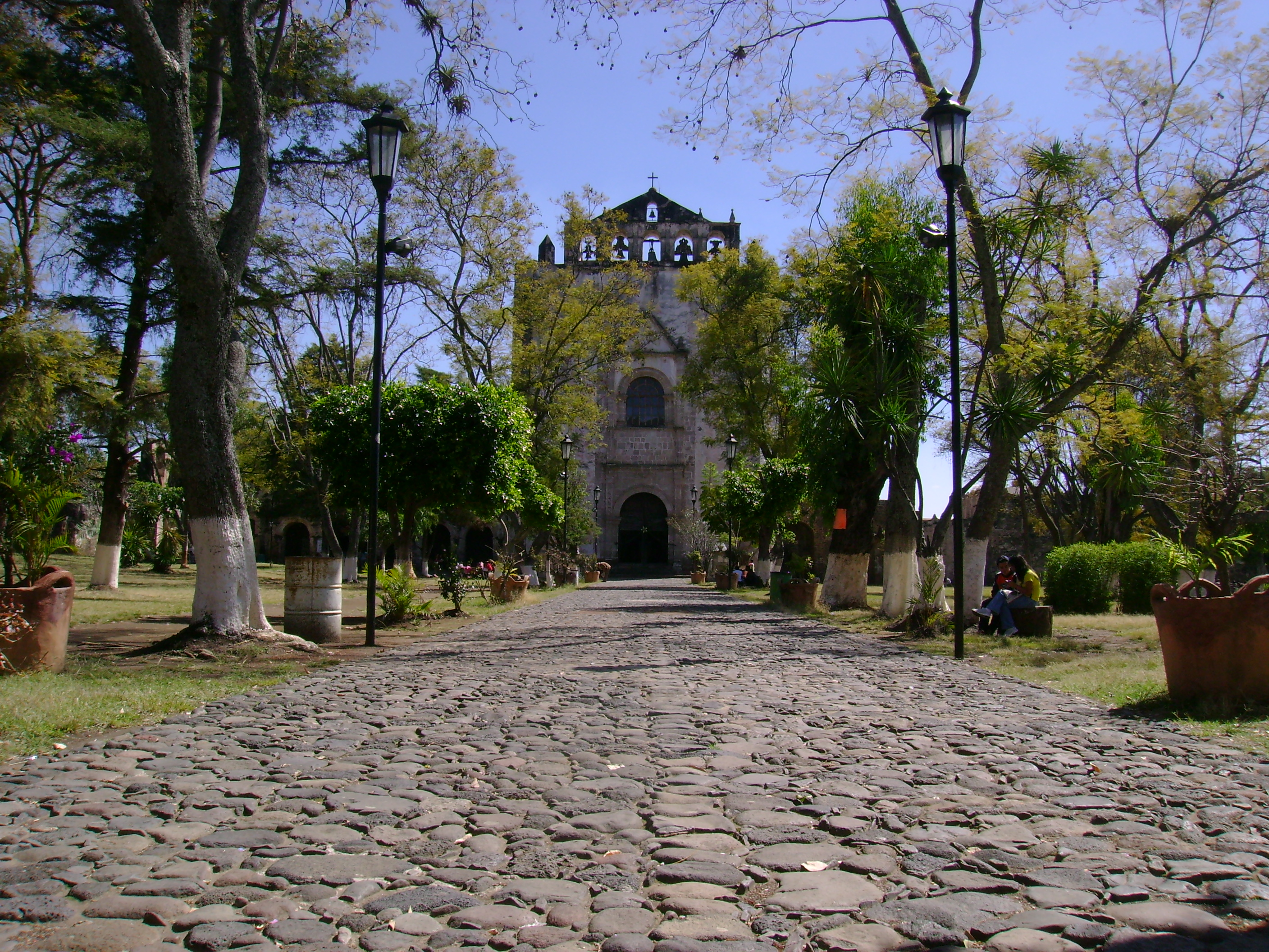 Templo y Antiguo Convento de San Juan Bautista